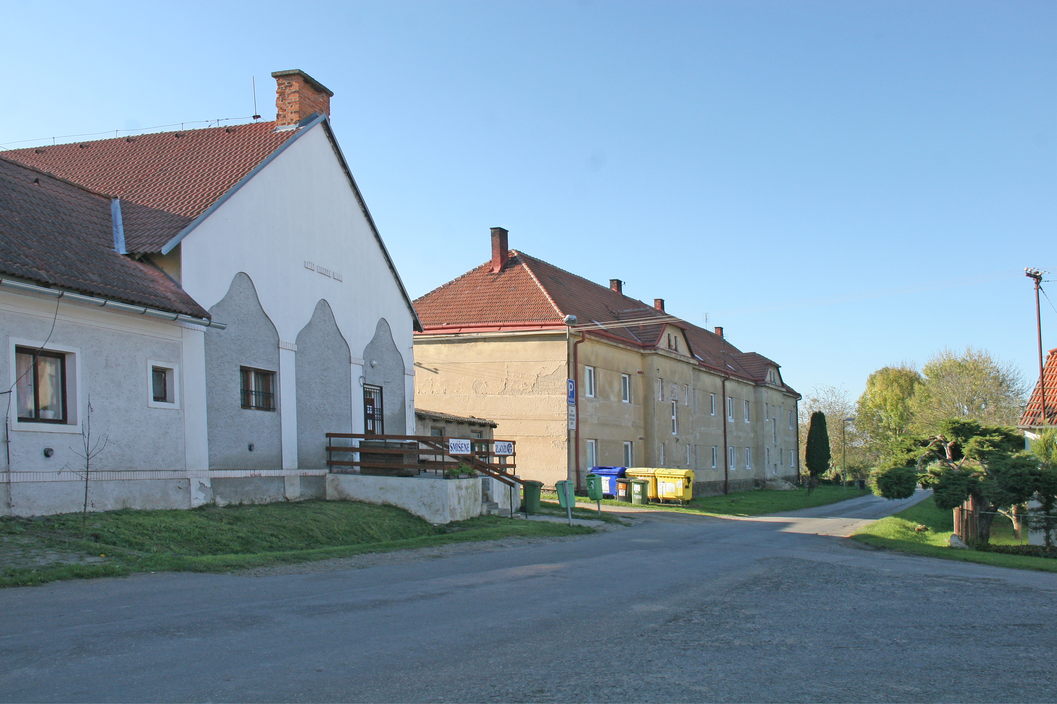 Vlačice obchod